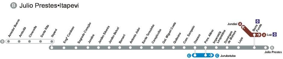 Line B - CPTM